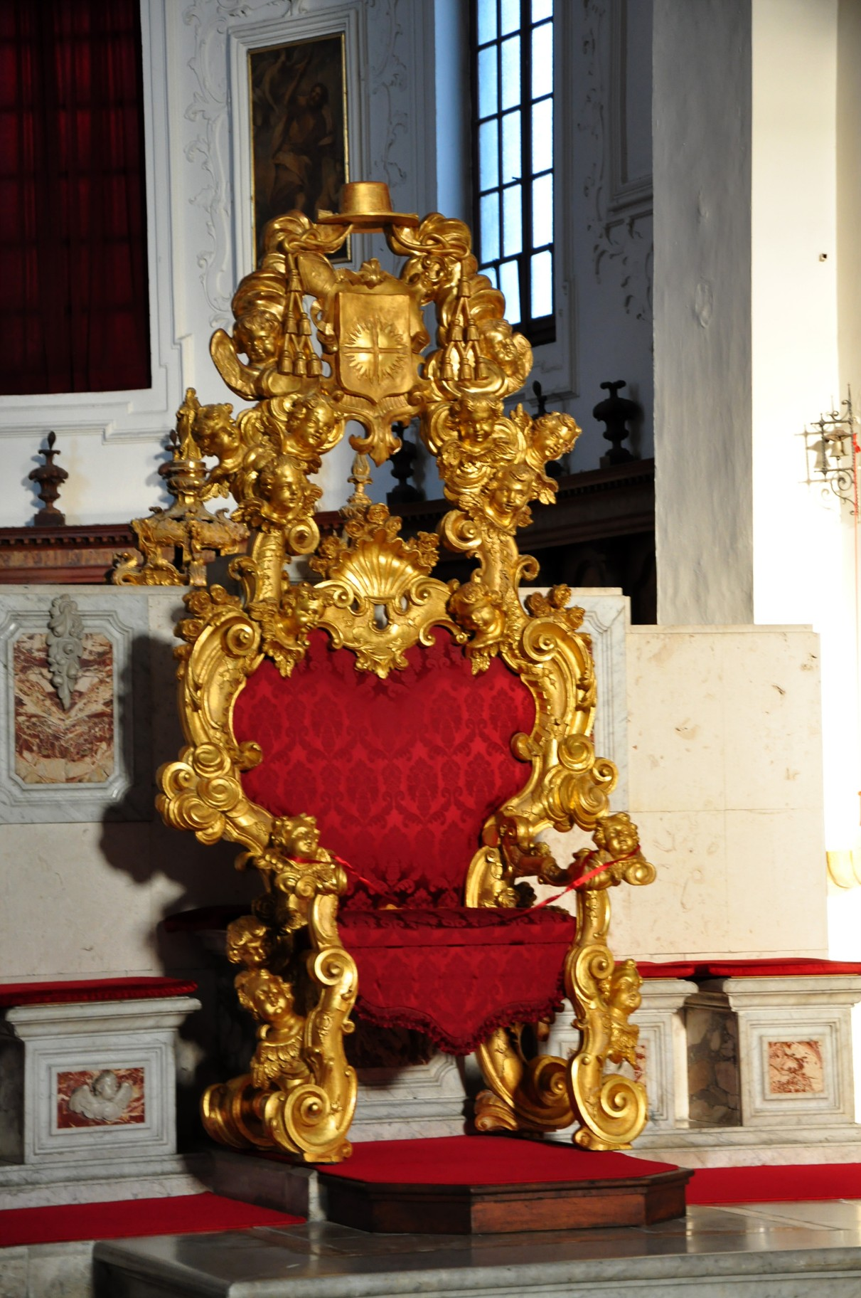 Koper (179)